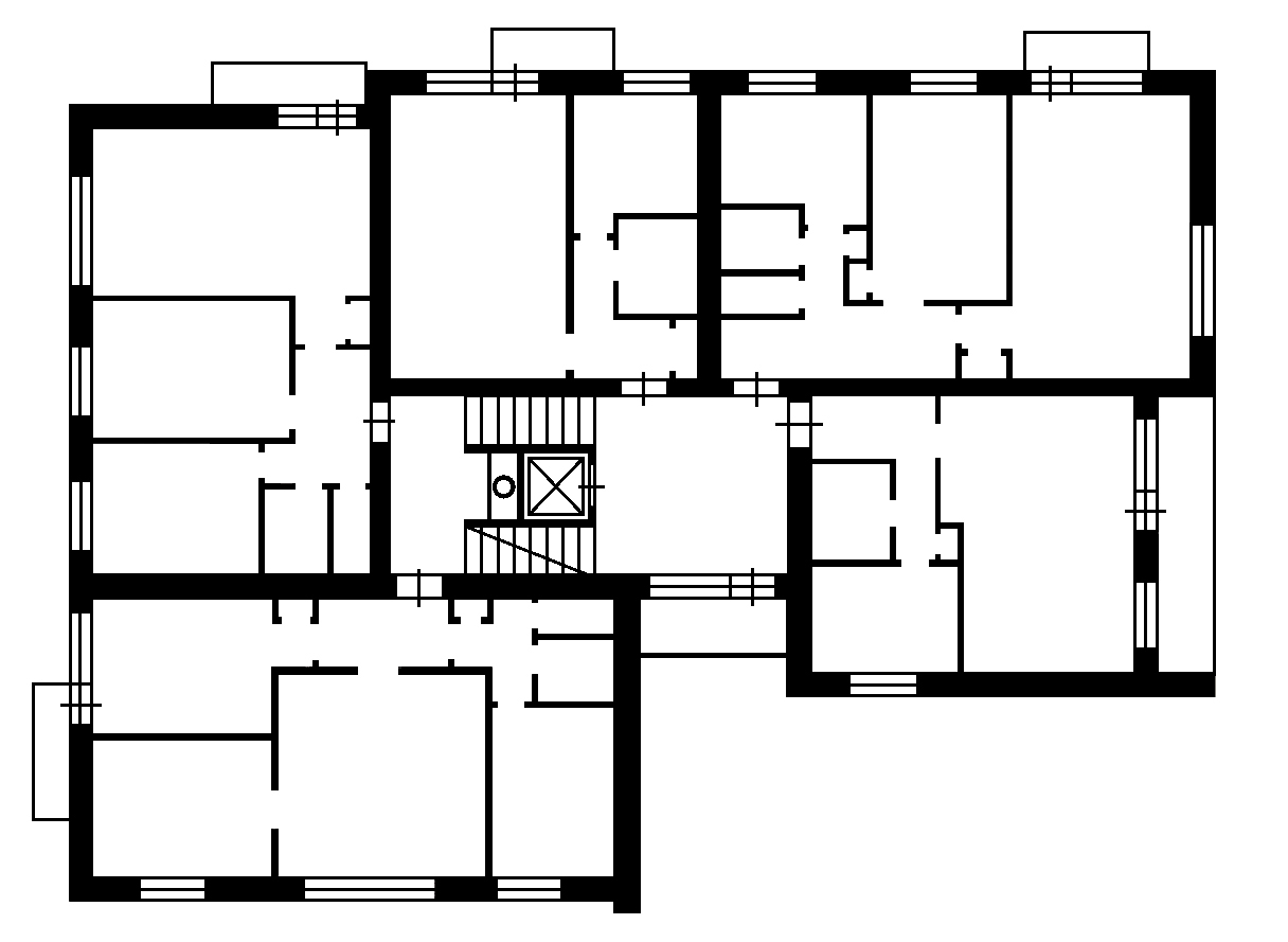 Схема-план точки Надёжина